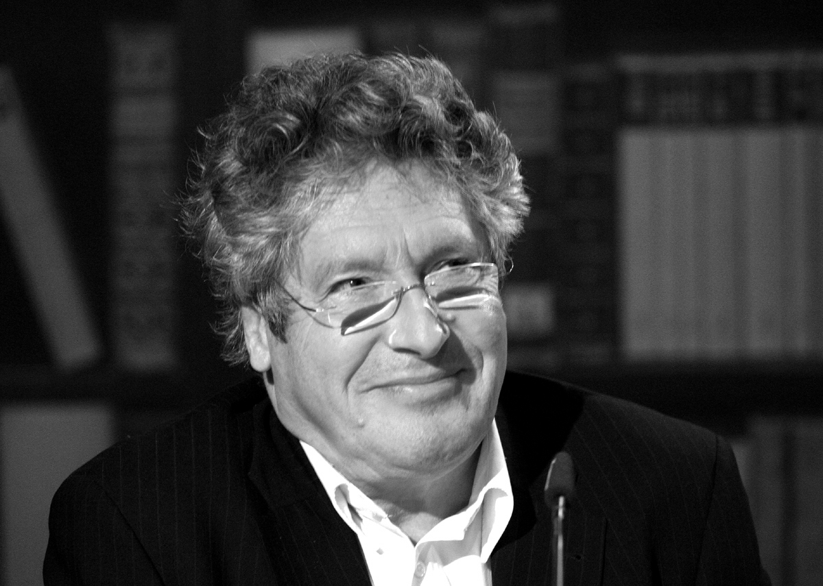 Volker Brandt auf dem WDR5-Literaturmarathon während der lit.Cologne 2008